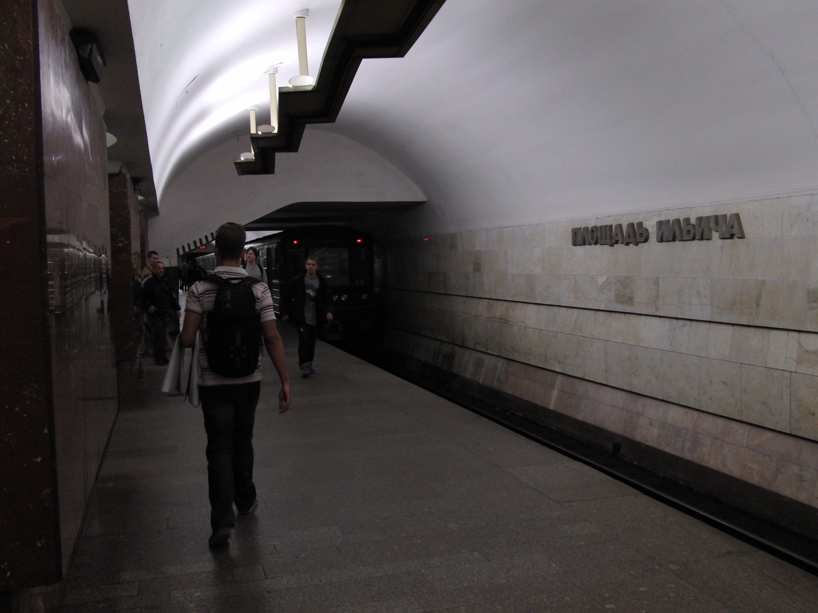 Ploshchad Ilyicha (Площадь Ильича)